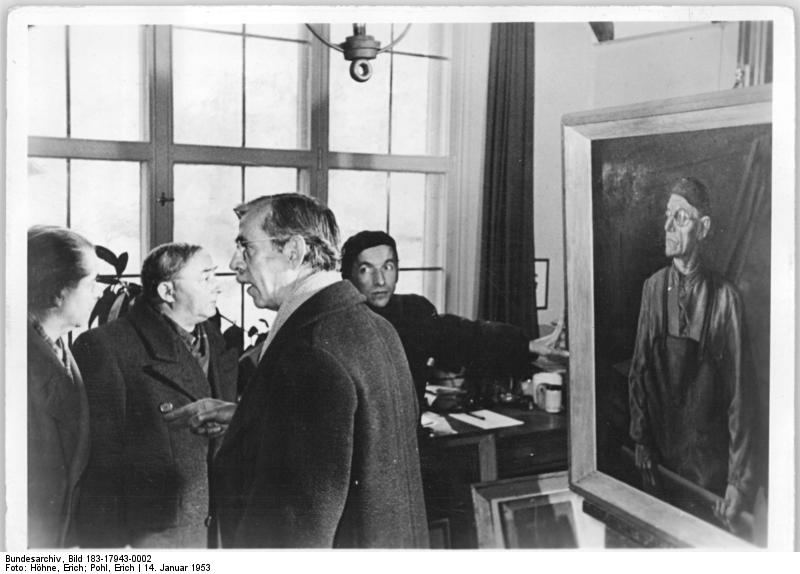 Dresden, Otto Nagel, Rudolf Nehmer Zentralbild Höhne-Pohl 14.1.1953 Vorbereitungen zur 3. Deutschen Kunstausstellung in Dresden In wenigen Wochen, am 1. März 1953, wird in Dresden die 3. Deutsche Kunstausstellung eröffnet, auf der die Künstler der Deutschen Demokratischen Republik gemeinsam mit den Künstlern Westdeutschlands ihre besten Arbeiten zeigen werden. Bedeutende Kunstschaffende besuchen jetzt die Ateliers der ausstellenden Künstler, um sie bei der Auswahl ihrer Werke zu beraten. UBz: Professor Nagel, Berlin, im Atelier des Kunstmalers Rudolf Nehmer, Dresden. Abgebildete Personen: Nagel, Otto Prof.: Maler, Präsident der Akademie der Künste (AdK), Nationalpreisträger, Vaterländischer Verdienstorden (VVO) in Gold, DDR (GND 118586300) Nehmer, Rudolf: Kunstmaler, DDR